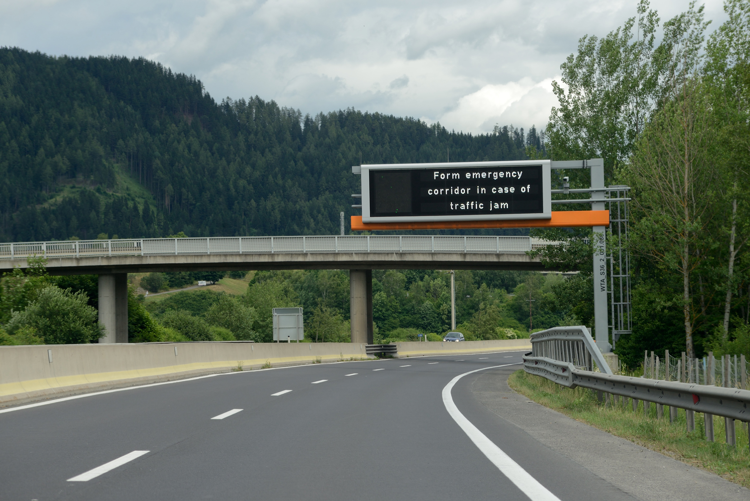 Display mit dem Hinweis auf Bildung der Rettungsgasse an der S36; Österreich.